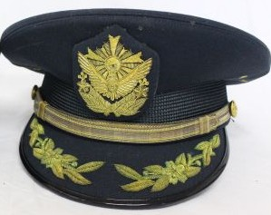 58式佐官礼装用正帽